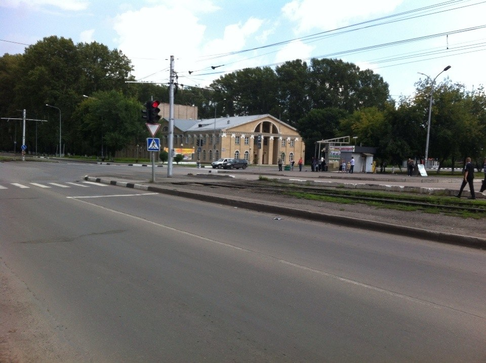 Дворец культуры имени XIX Партсъезда в Орджоникидзевском районе Новокузнецка